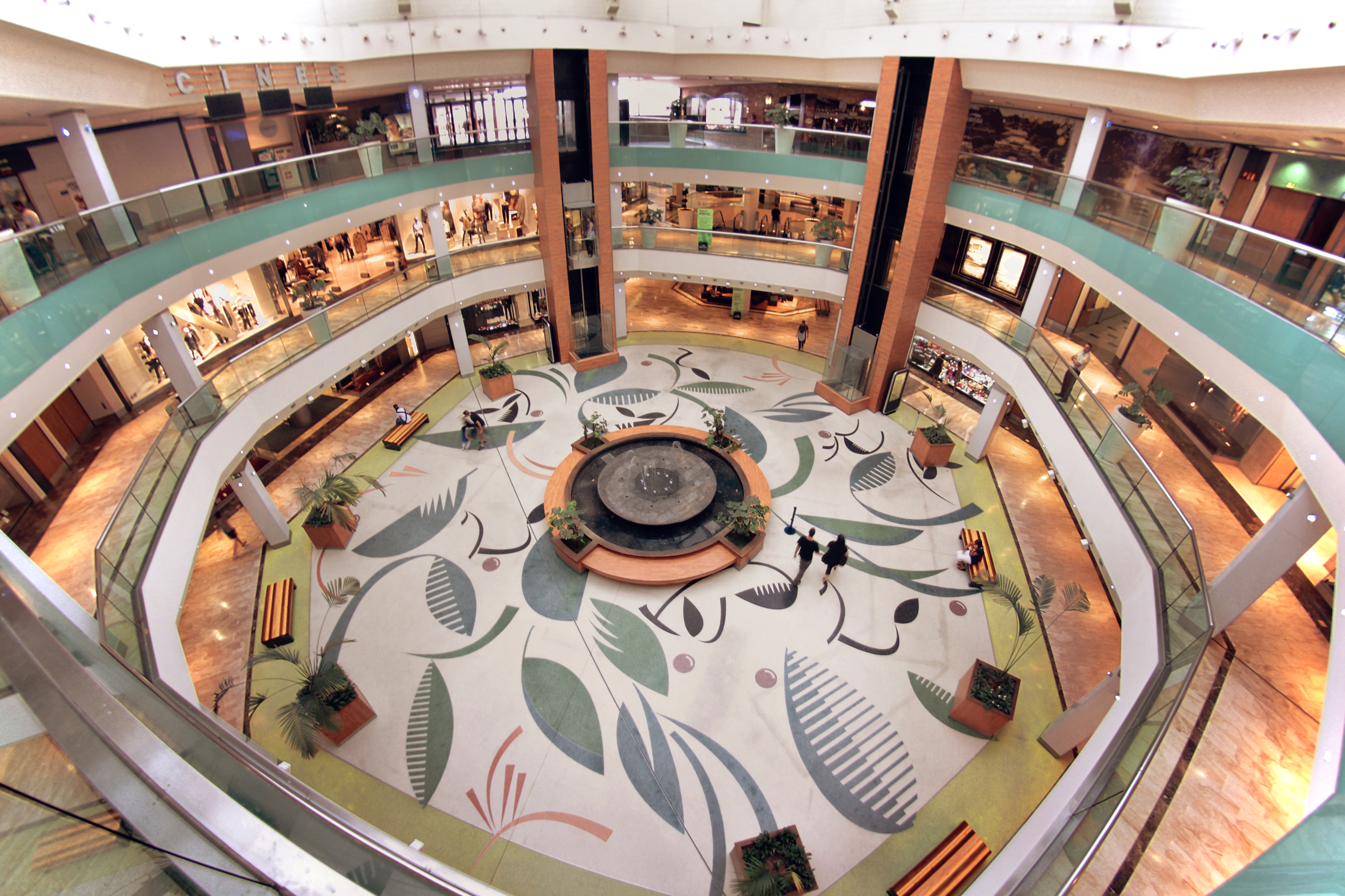 Zaragoza, España